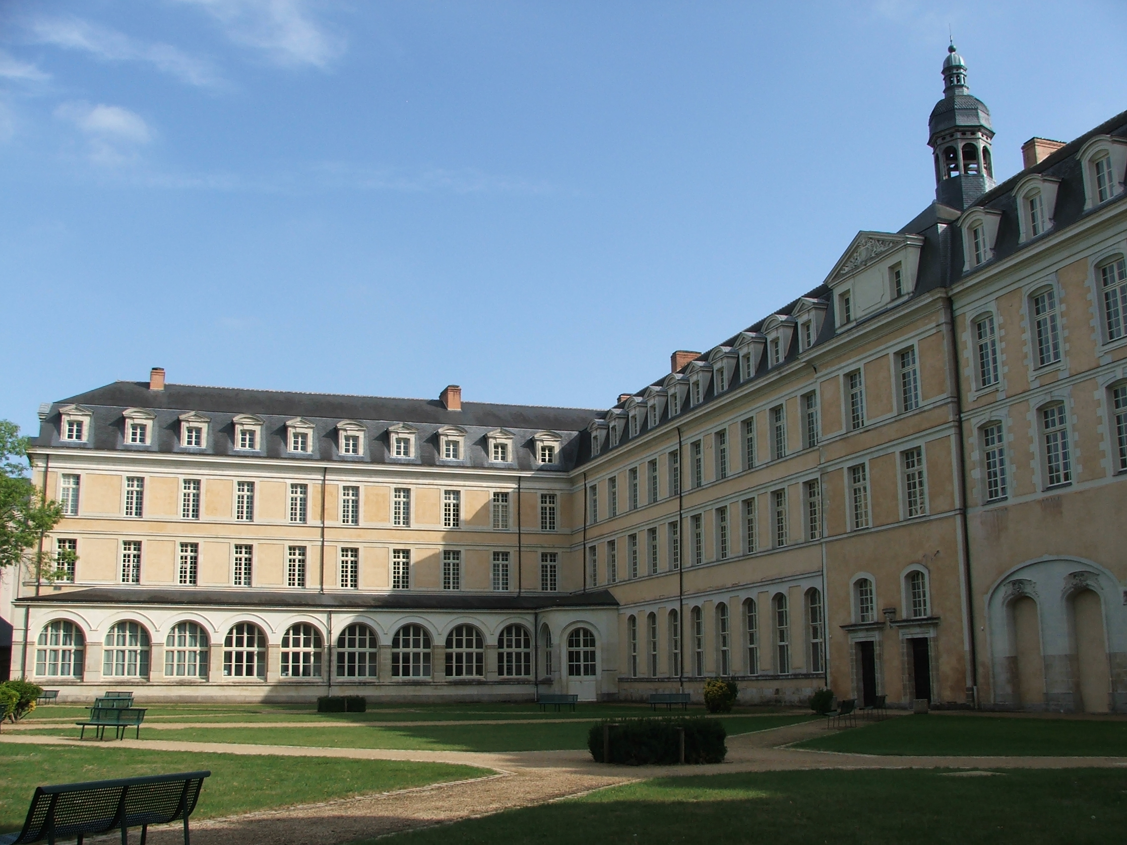 Jardins du Lycée Bellevue au Mans, ancienne Abbaye Saint-Vincent du Mans.